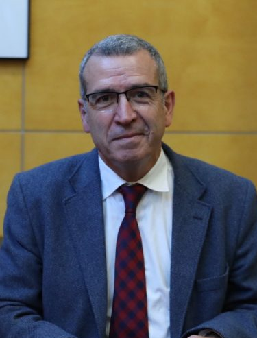 La alcaldesa firma un memorando de colaboración (MOU) con esMontañas, una red con más de 270 municipios de montaña del país, y otro con Lumbini, la cuna de Buda.